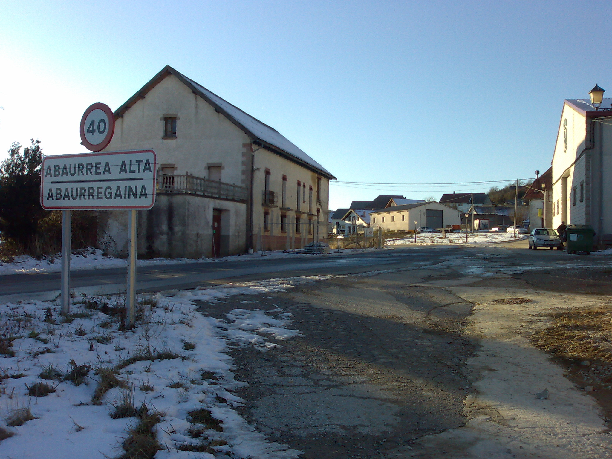 Abaurregaineko herriaren ikuspegia.